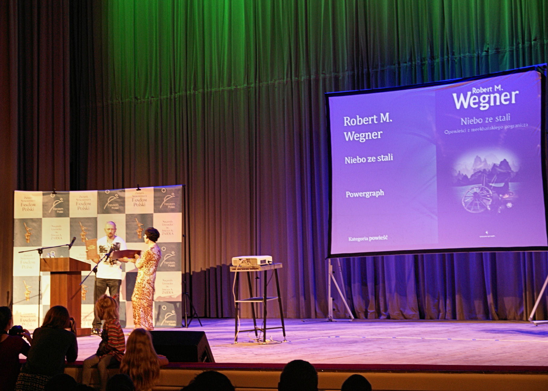 Robert M. Wegner i Jadwiga Zajdel na gali rozdania nagród im. Janusza A. Zajdla, Polcon 2013, Warszawa